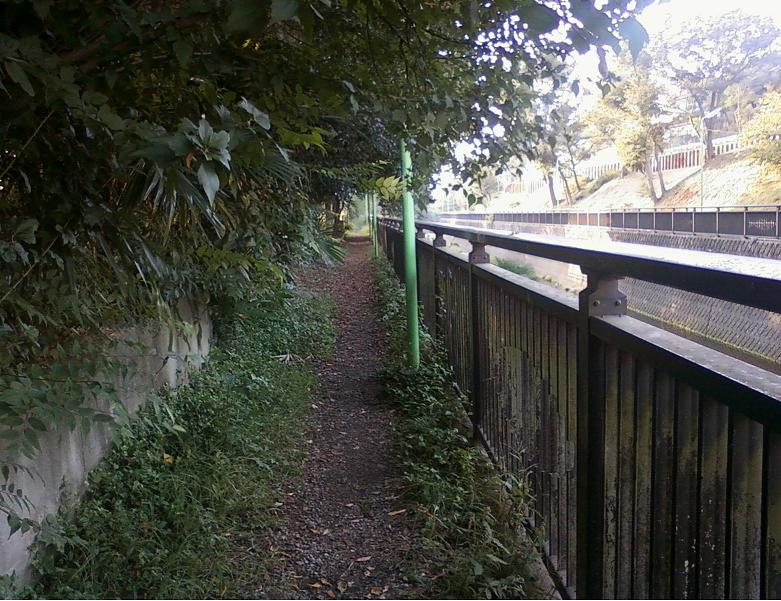 仙川側道（成城学園前駅方面を向く）